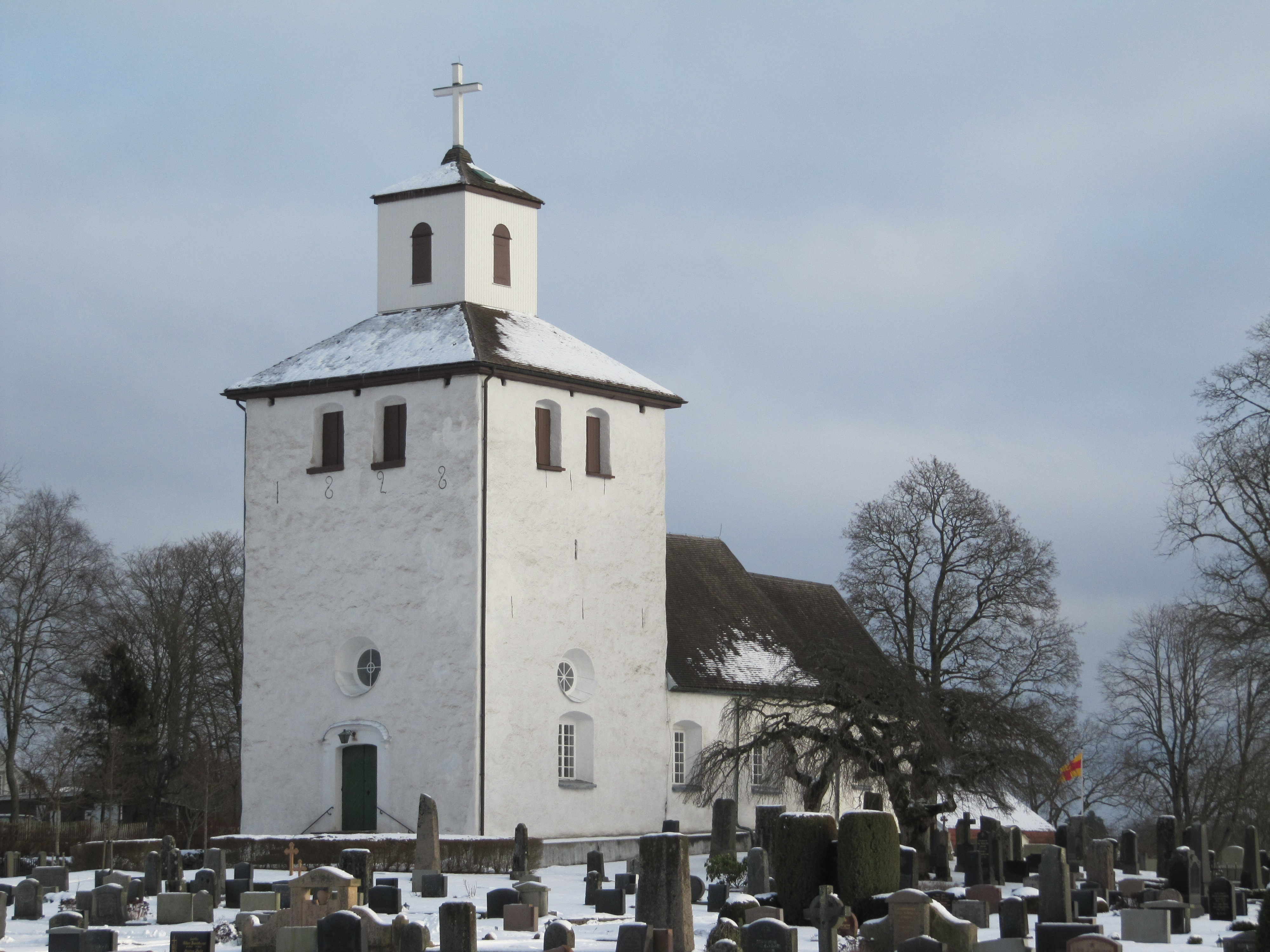 Vittsjö kyrka